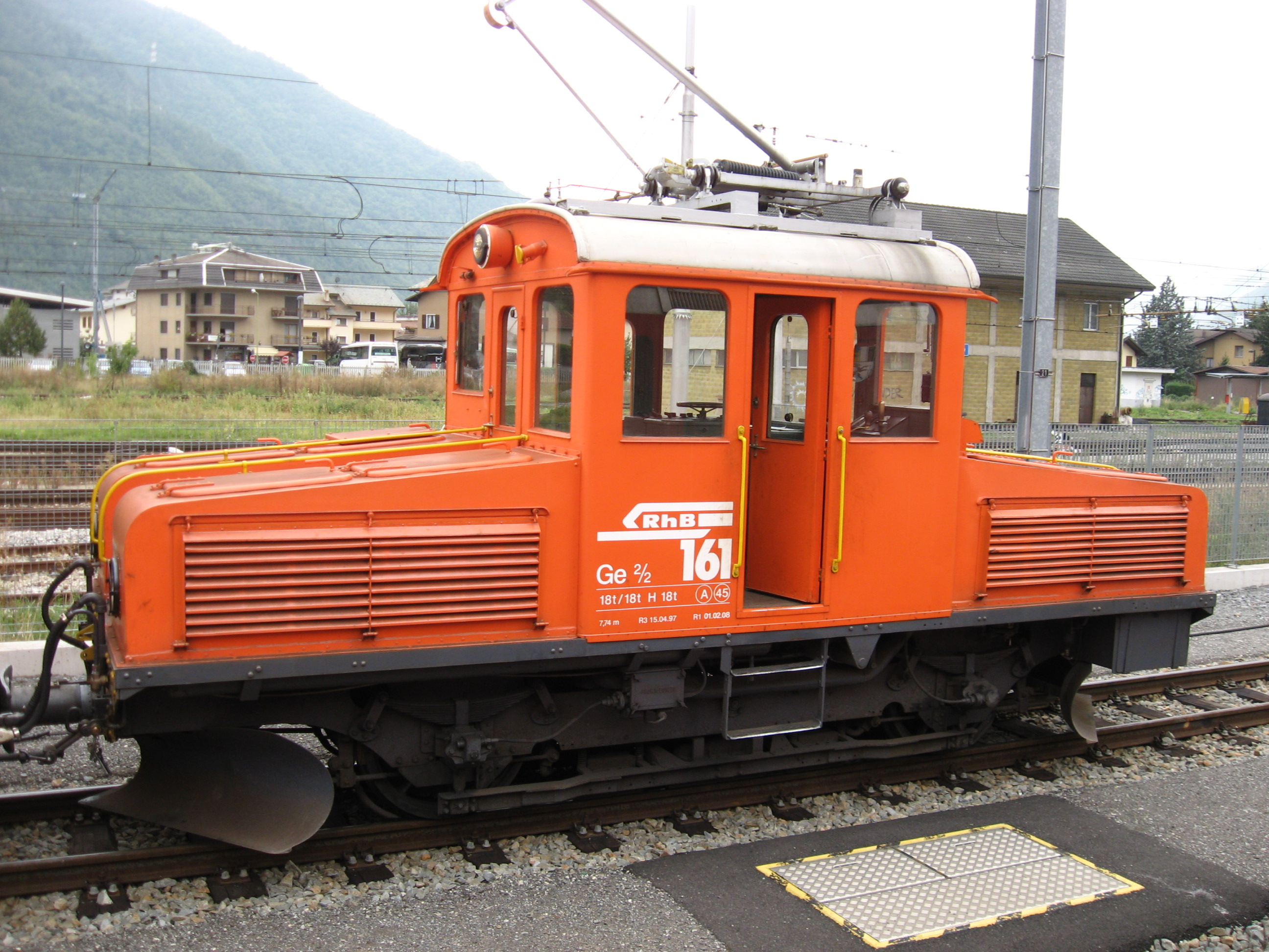 Hulplocomotief voor het rangeerwerk